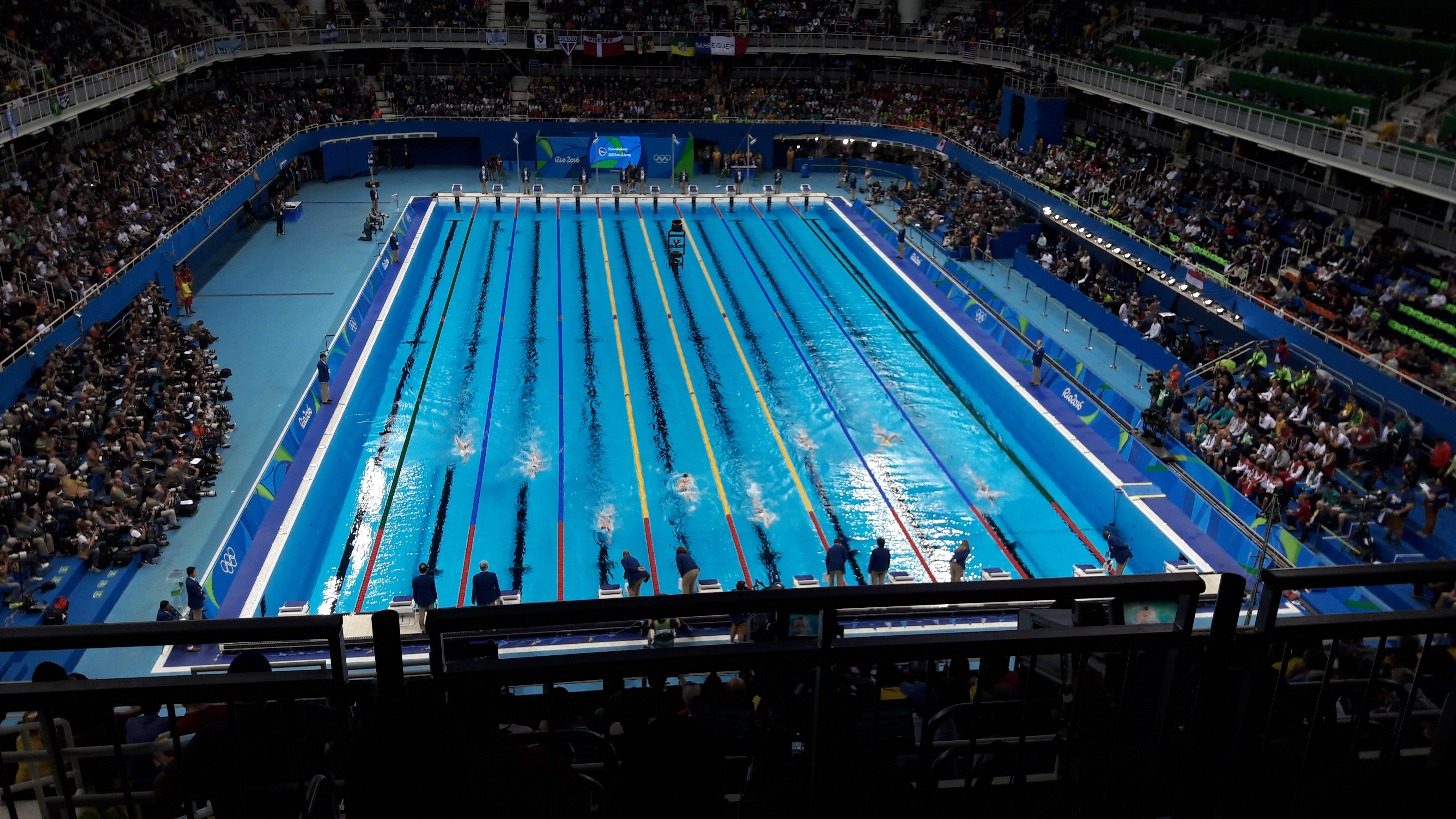 Noite de finais na natação